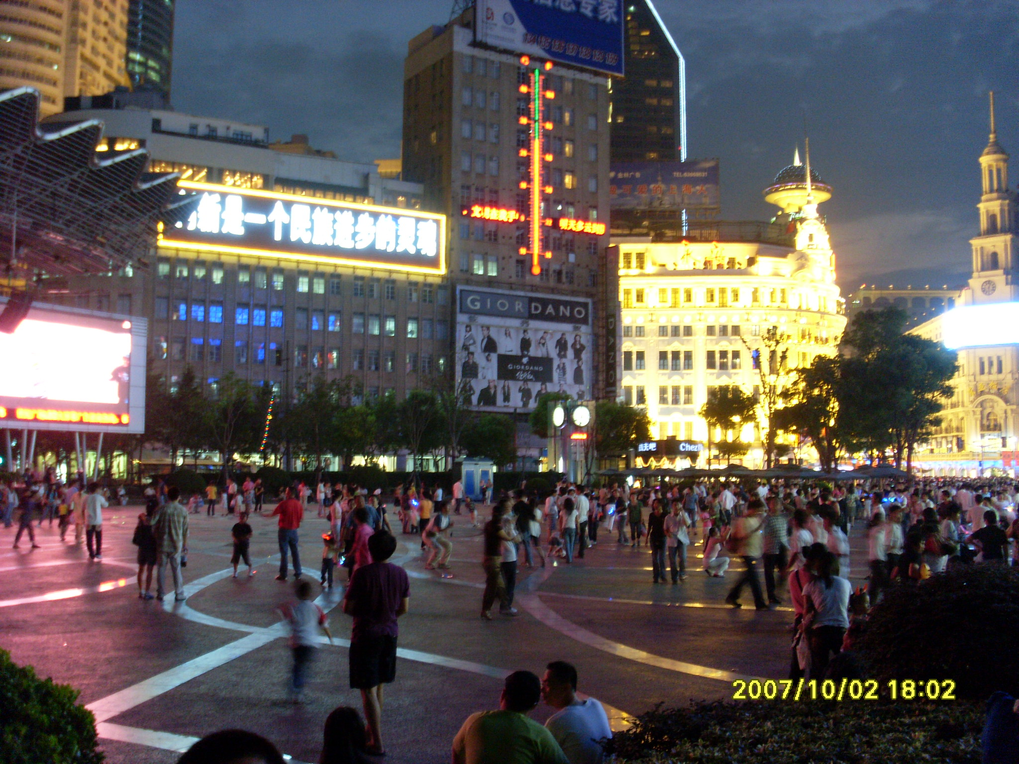 创新是...